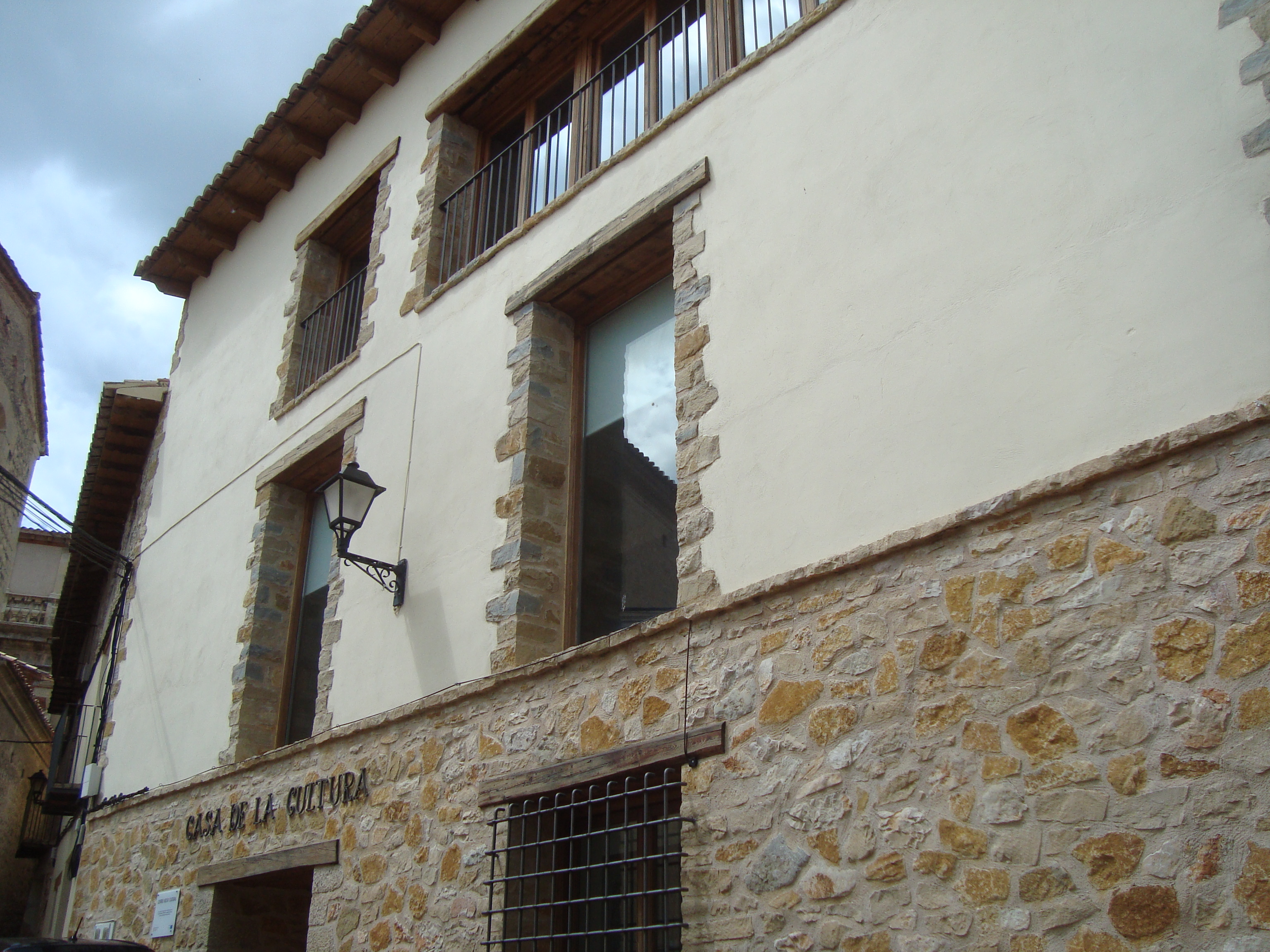 Casa de la Cultura de Zorita del Maestrazgo-Sorita